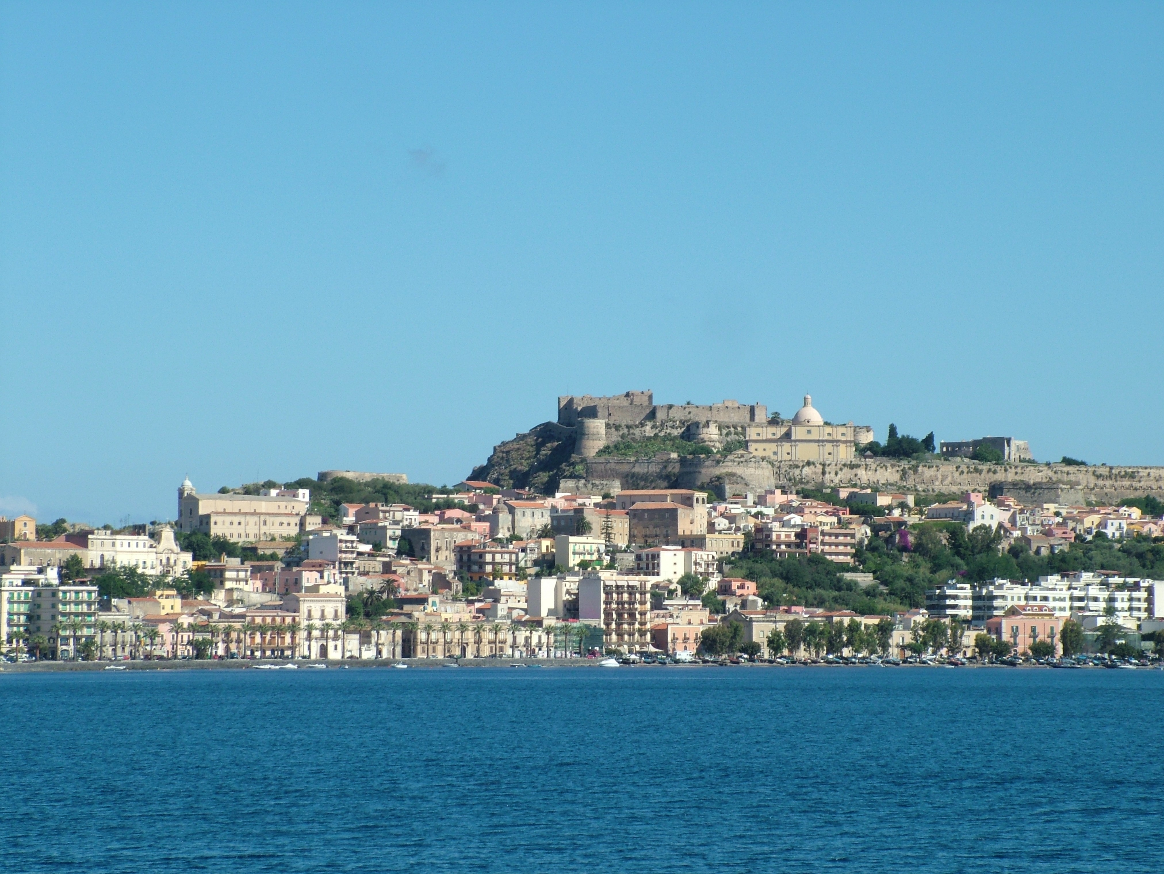 Milazzo, Sizilien